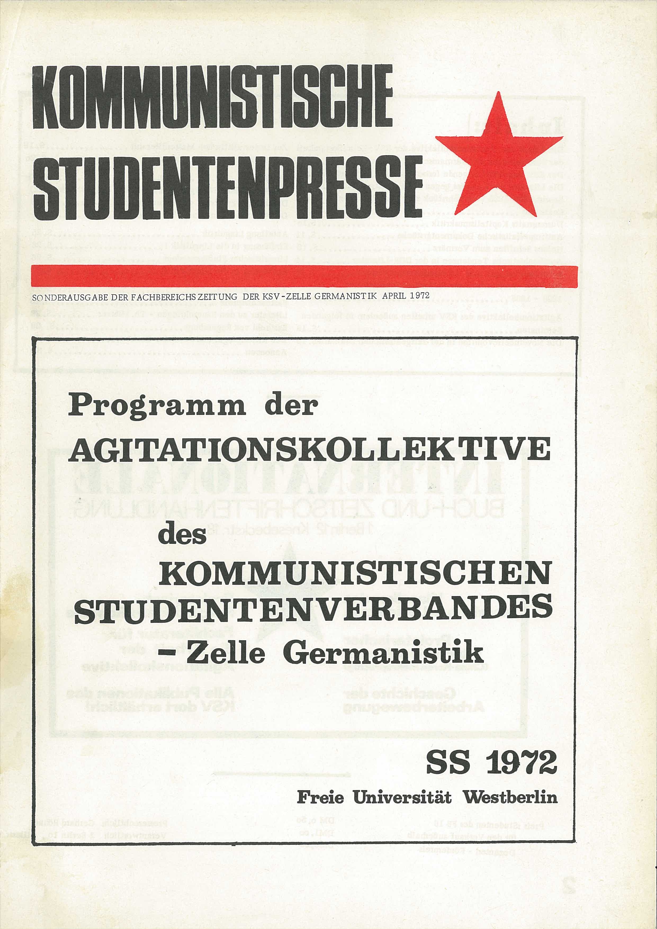 Kommunistische Studentenpresse ‒ Germanistik FU Programm der Agitationskollektive des Kommunistischen Studentenverbandes ‒ Zelle Germanistik SS 1972, Berlin [1972]